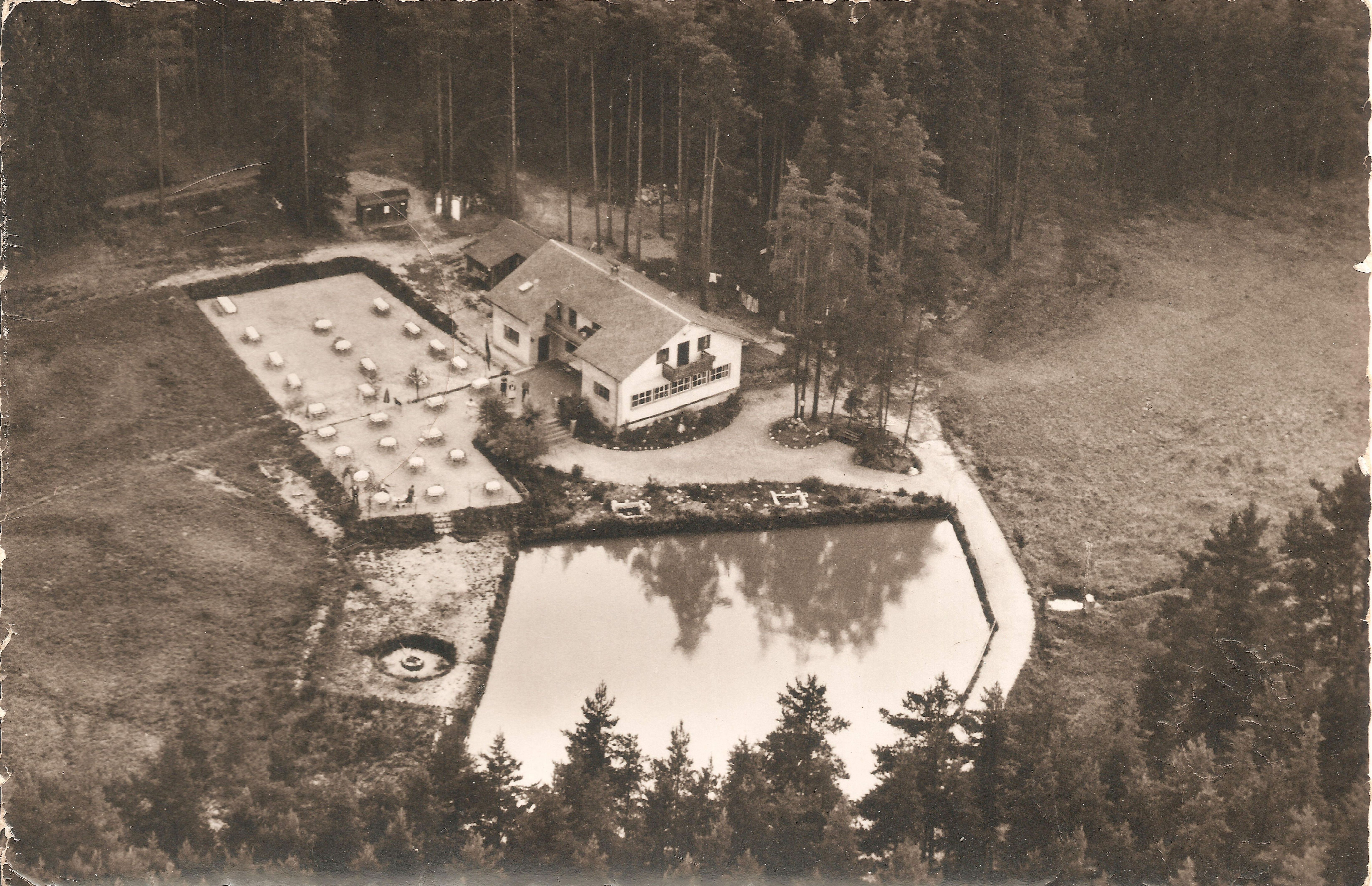 Naturfreundehaus Seedorf, Grenzlandhütte, ca. 1959